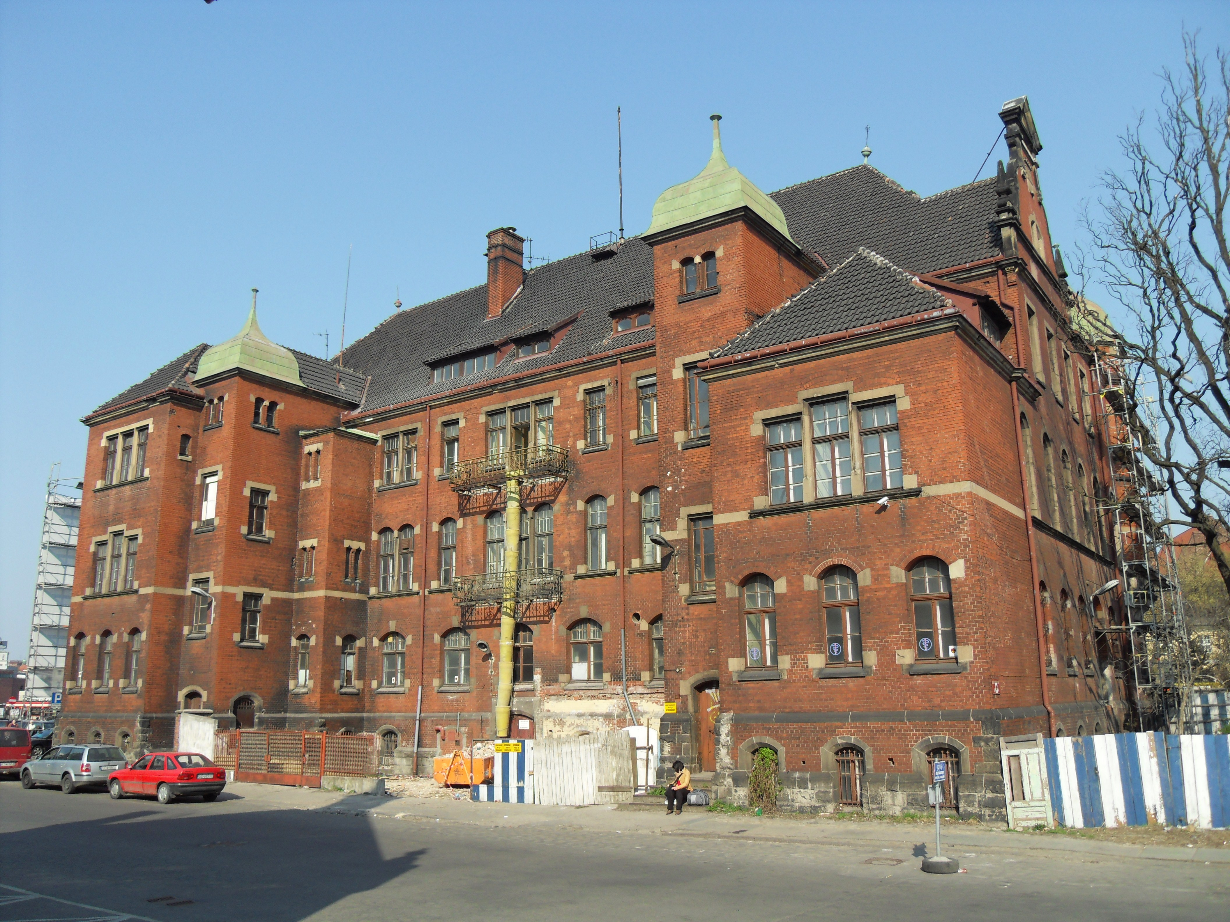 Gdańsk, ul. Podwale Grodzkie 4 - dawna siedziba naczelnika kolei, następnie przychodnia kolejowa, obecnie w przebudowie (od października 2015 hotel i browar), 1900.